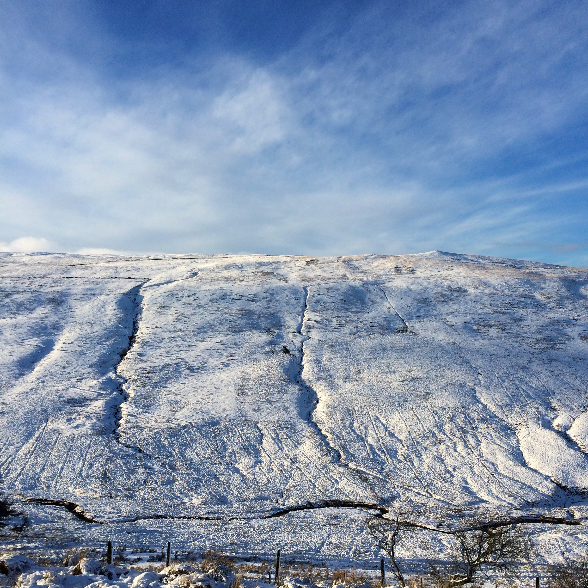 Cefn Cul, Bannau Brycheiniog